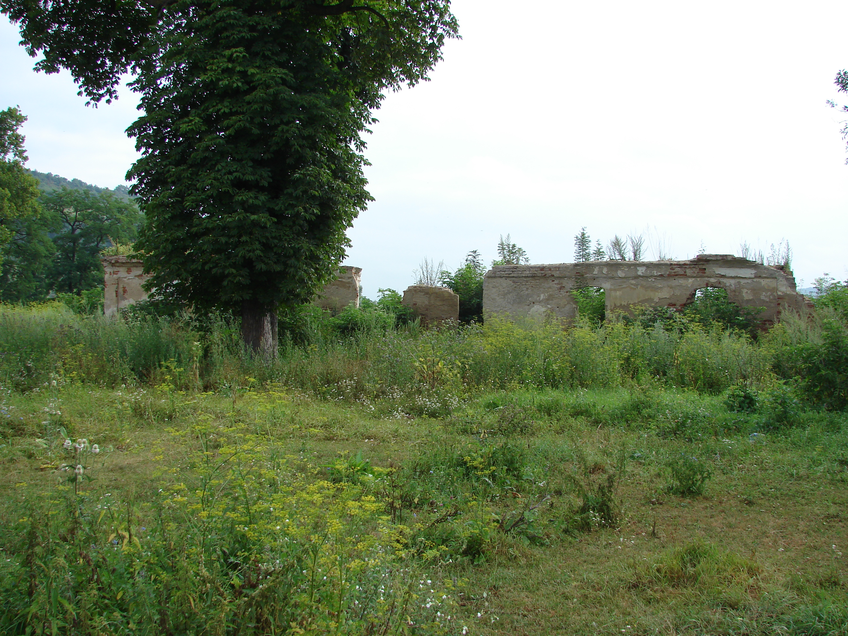 Poza 11 03